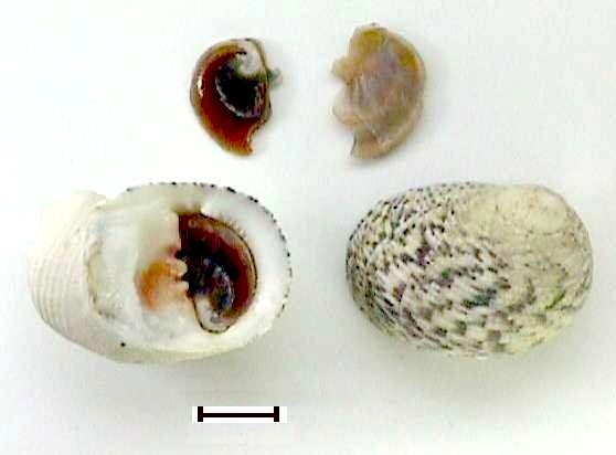 Nerita peloronta Linnaeus, 1758 colectadas en 1986 en Archipiélago Los Monjes, Dependencias Federales - Venezuela